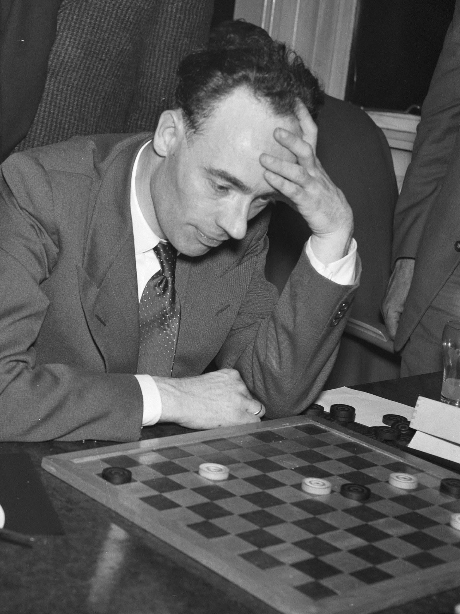 Collectie / Archief : Fotocollectie Anefo Reportage / Serie : [ onbekend ] Beschrijving : Damkampioenschap Nederland. Wim Roozenburg winnaar Datum : 9 maart 1957 Locatie : Nederland Trefwoorden : damsport Persoonsnaam : Roozenburg, Wim Fotograaf : Rossem, Wim van / Anefo Auteursrechthebbende : Nationaal Archief Materiaalsoort : Negatief (zwart/wit) Nummer archiefinventaris : bekijk toegang 2.24.01.04 Bestanddeelnummer : 908-3845